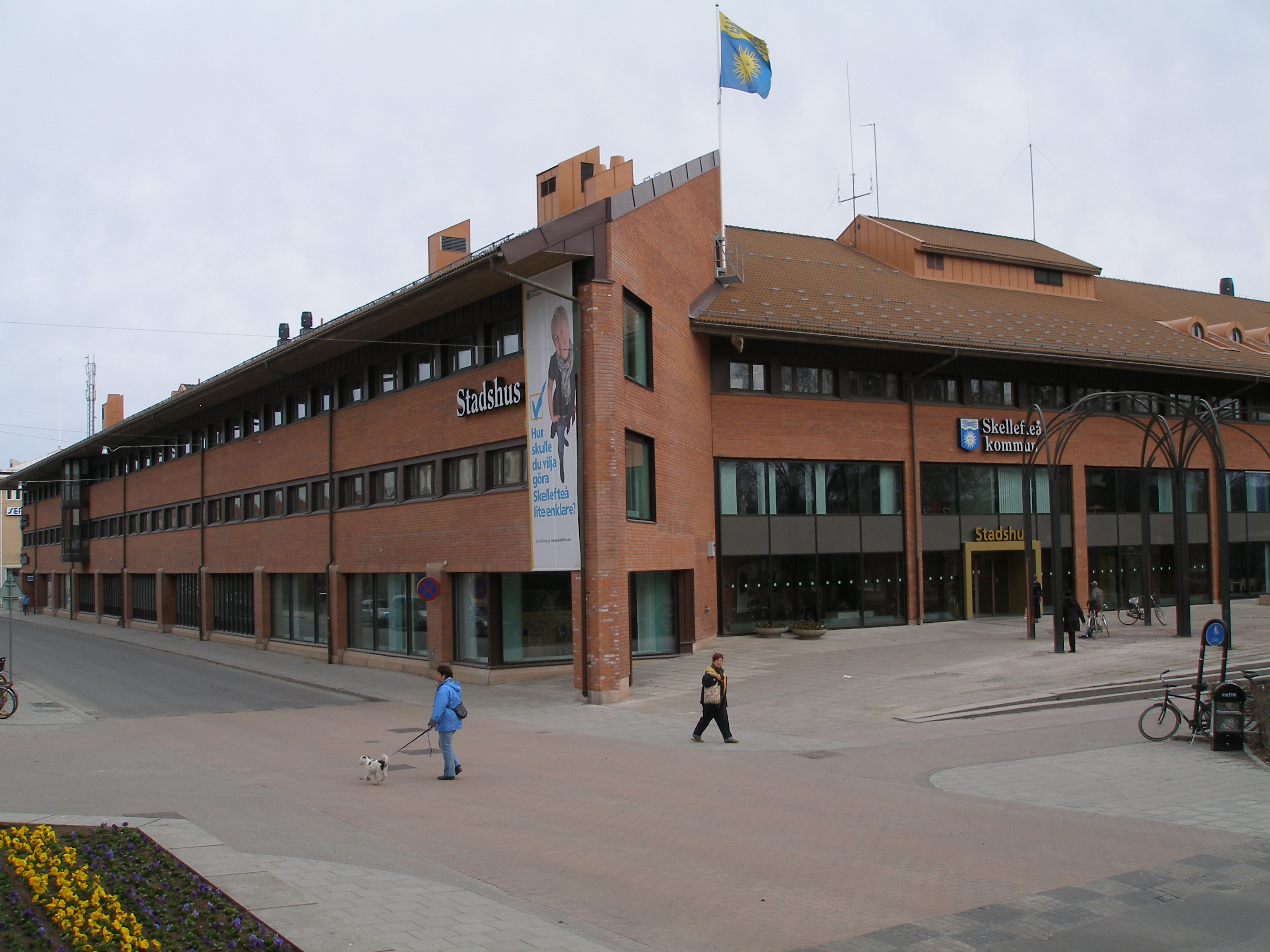 Stadshuset (Brinken) i Skellefteå efter ombyggnad av entré och hörnet av byggnaden.